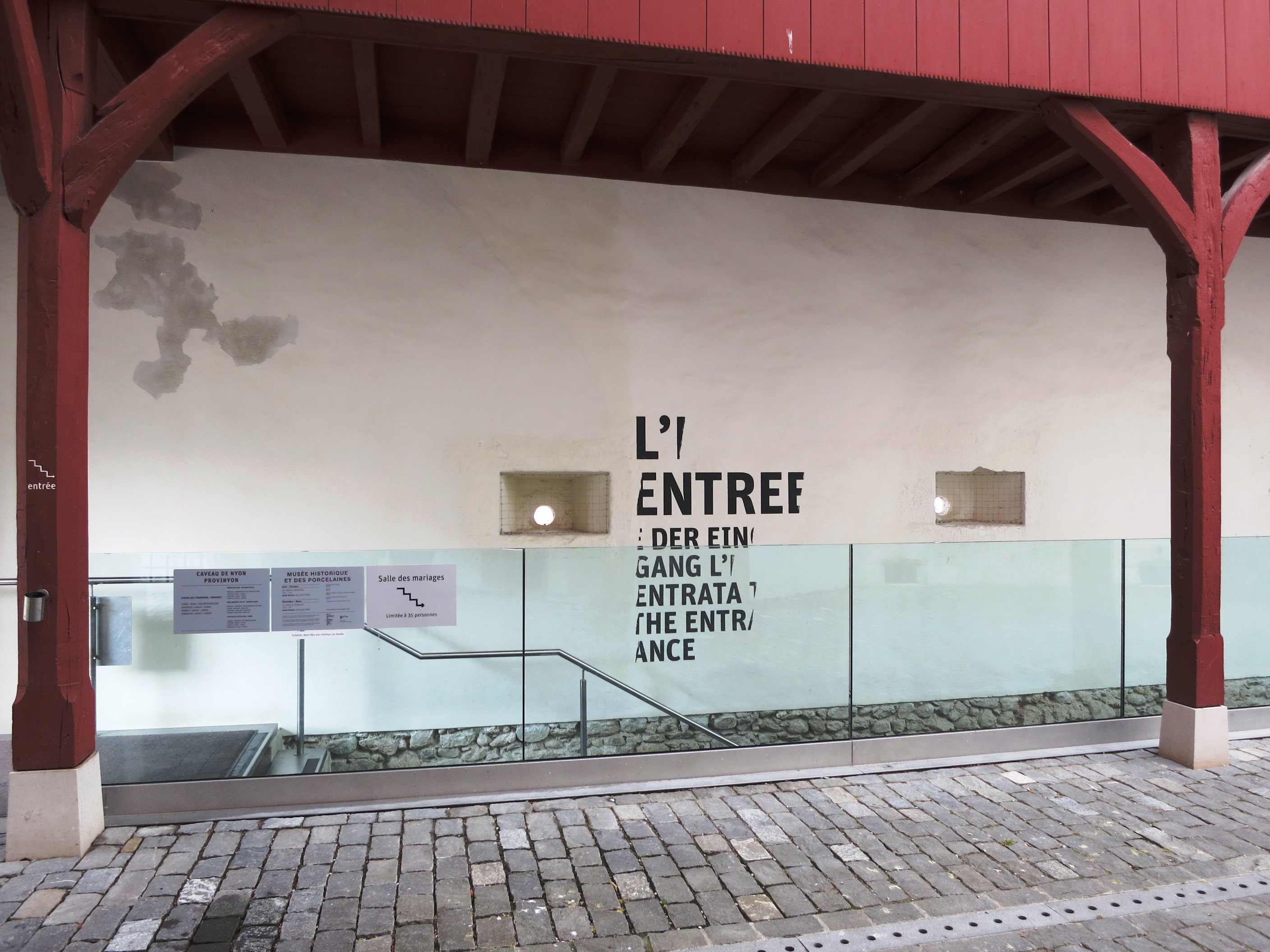 Historisches Museum, Nyon VD, Schweiz